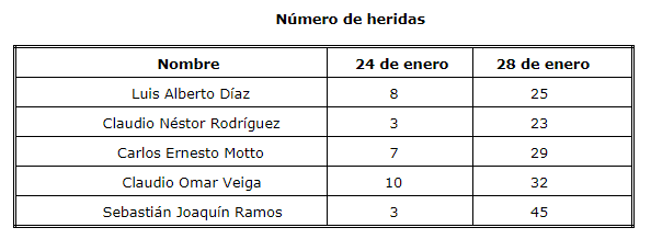 Comisión Interamericana de Derechos Humanos. Informe en Caso 11.137 del 8/11/97 en "Abella y otros contra Argentina" (Copamiento de La Tablada). Tabla realizada por Amnesty International sobre la base de la comparación de los informes médicos policial (24 de enero) y penitenciario (28 de enero). Cuenta las heridas de cada persona al momento de ser detenido y cuatro días después.